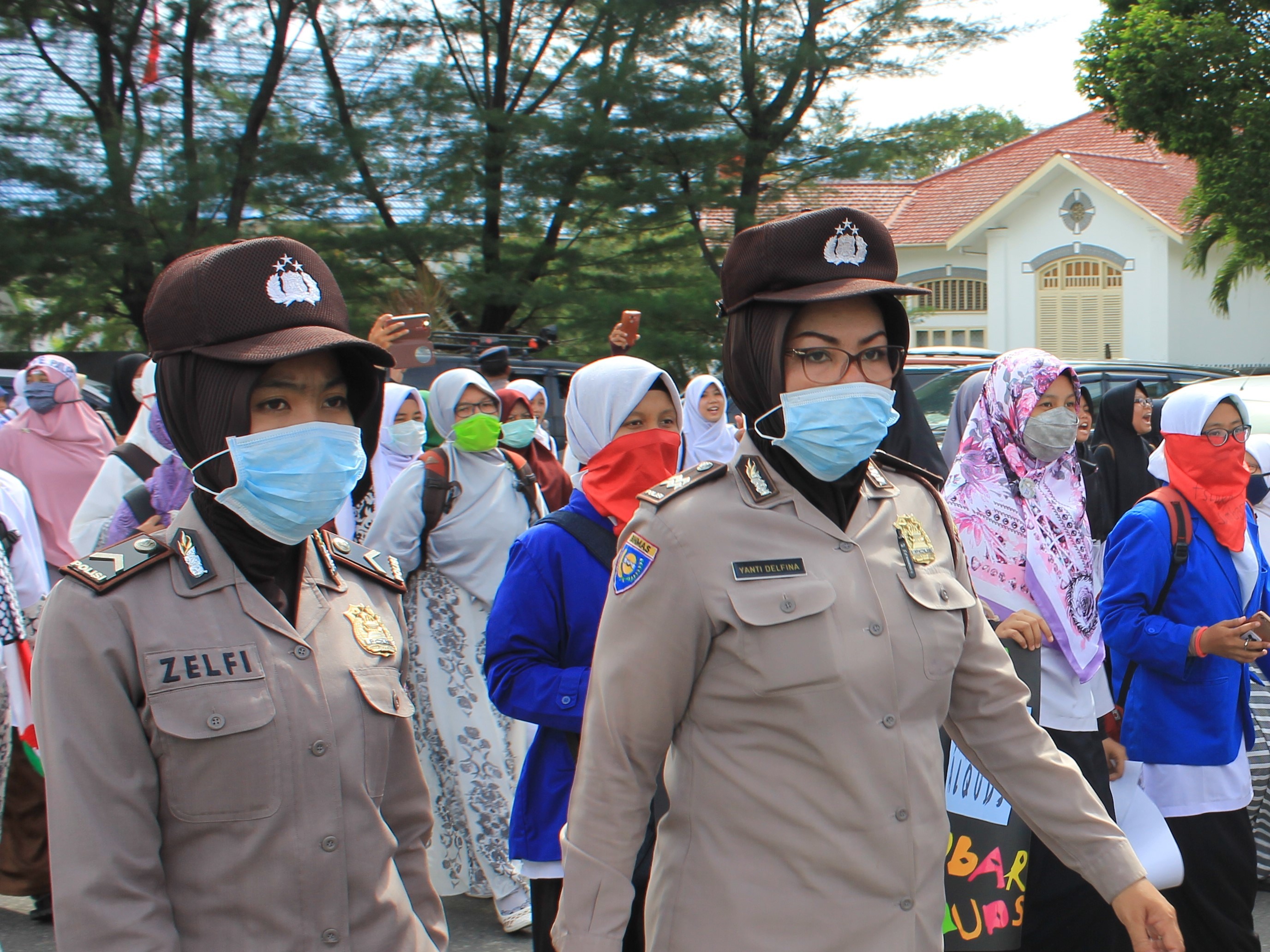 Polisi Muslimah Padang jilbab crop